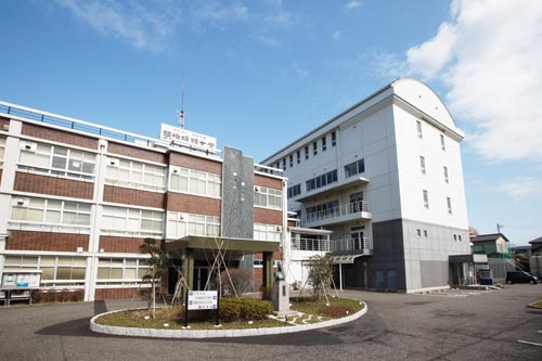 明倫短期大学校舎